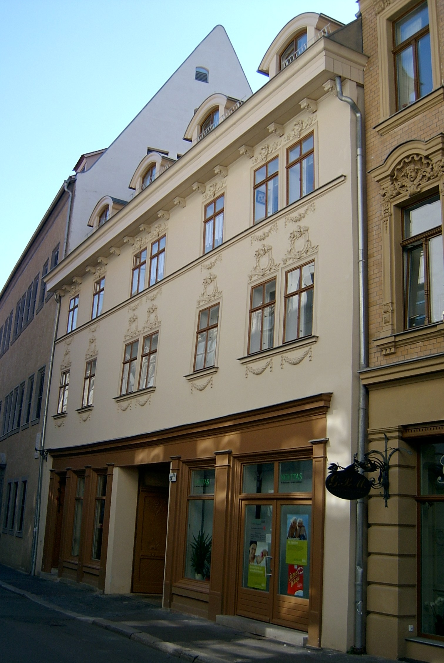 Große Märkerstraße 23 in Halle (Saale)